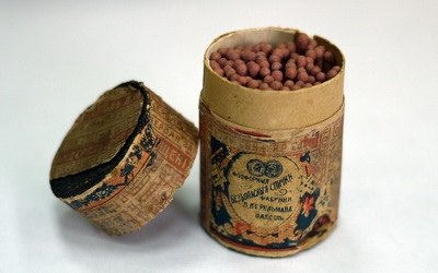 Набор спичек «Брестская крепость»